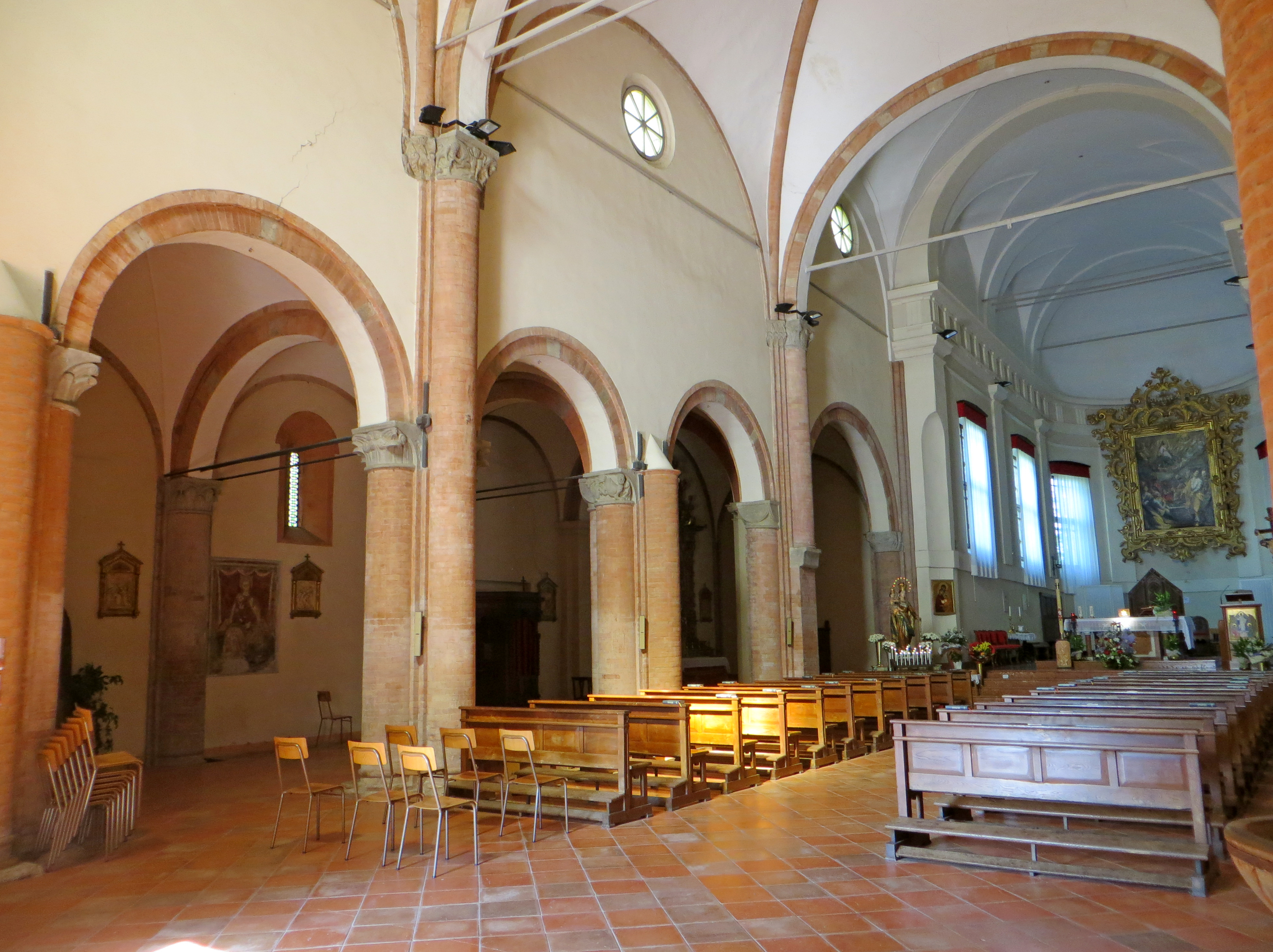 Monastero di Santa Maria Assunta (Castione Marchesi, Fidenza) - navata centrale e sinistra